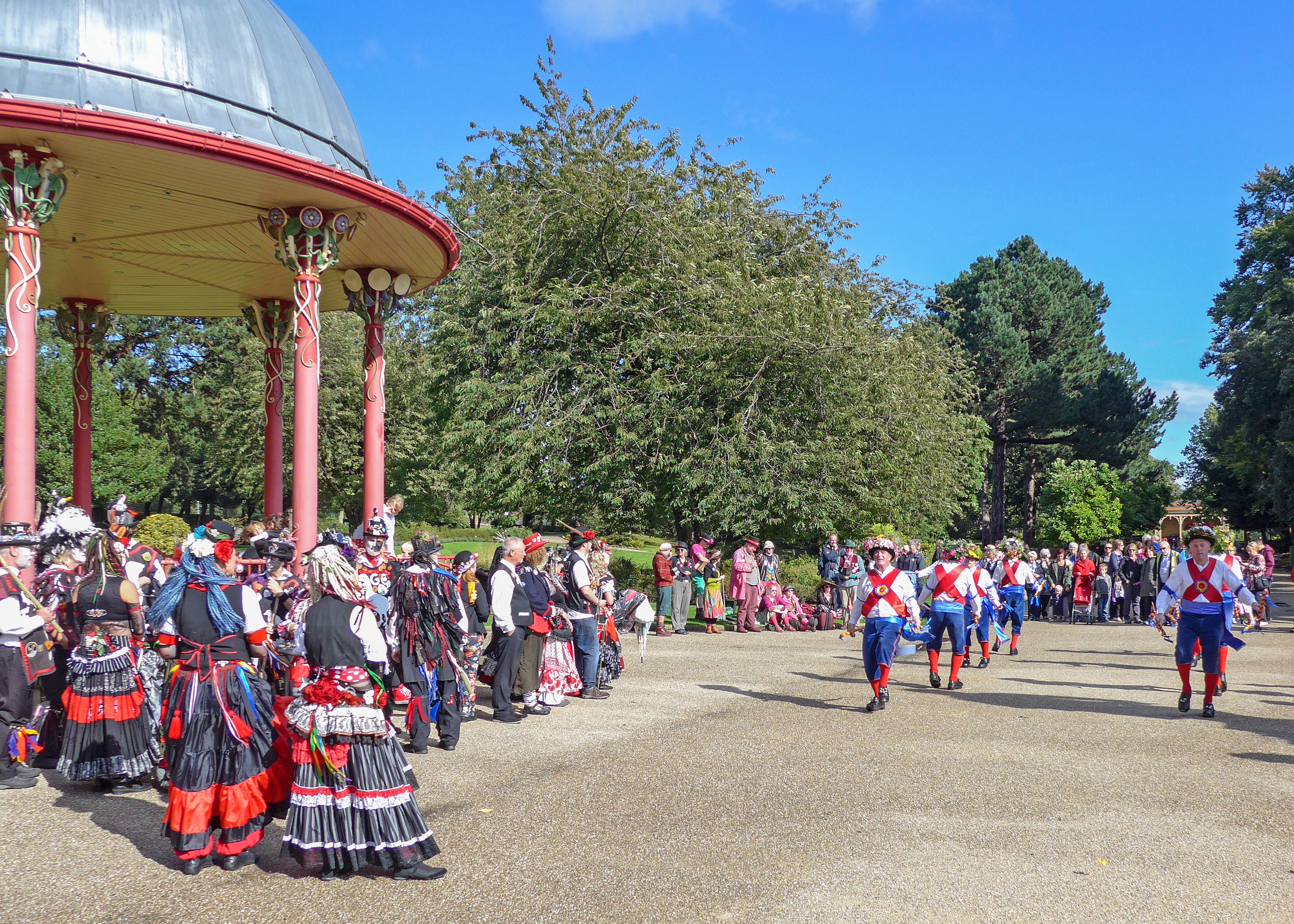 Saltaire Festival